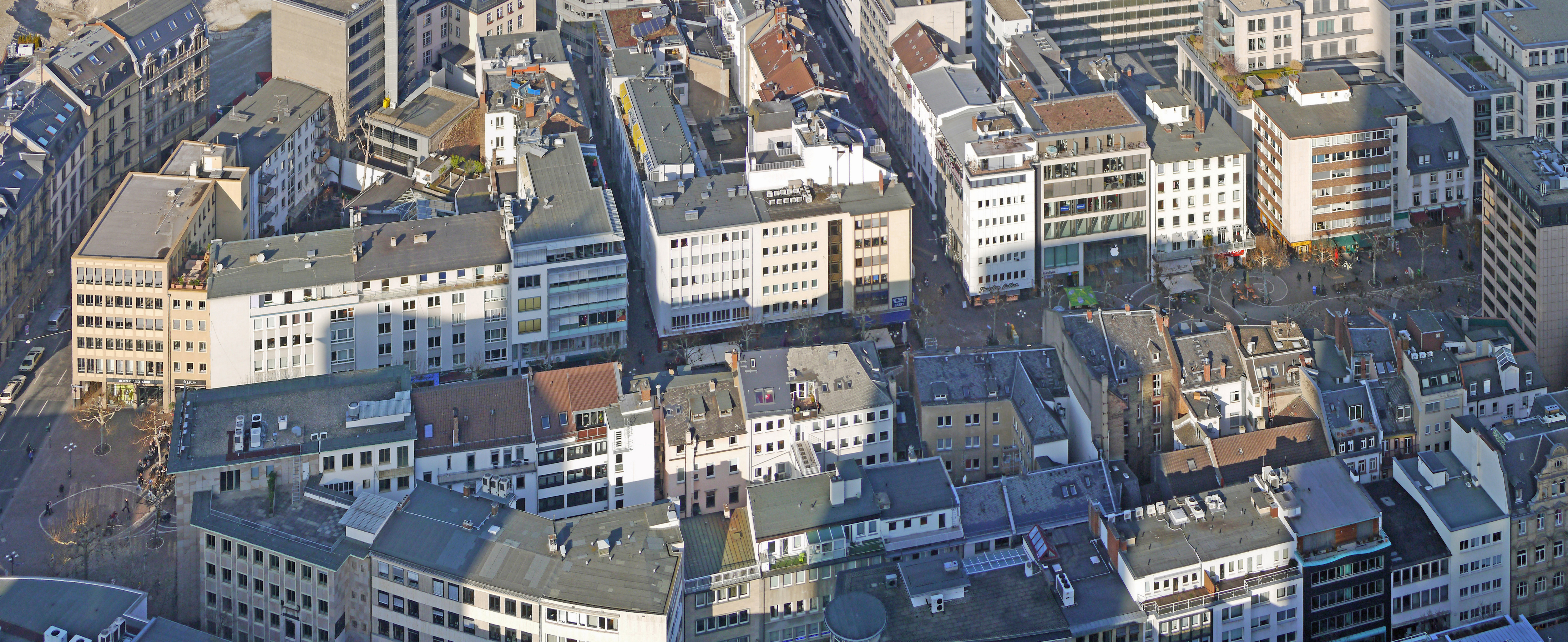 Die Fressgass (Grosse Bockenheimer Strasse und Kalbächer Gasse), 2013 vom MainTower aus.